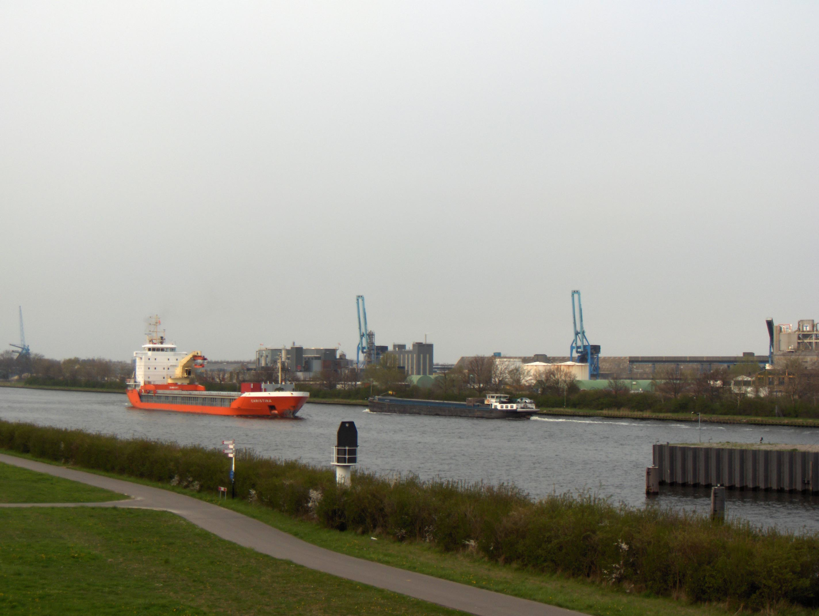 Beschreibung: Terneuzen-Gent-Kanal (Gemeinde Terneuzen), Ansicht vom Westufer an der Brücke der N61 (Niederlande), Blick nordostwärts. Datum: 23. April 2006 Fotograf: Friedrich Tellberg